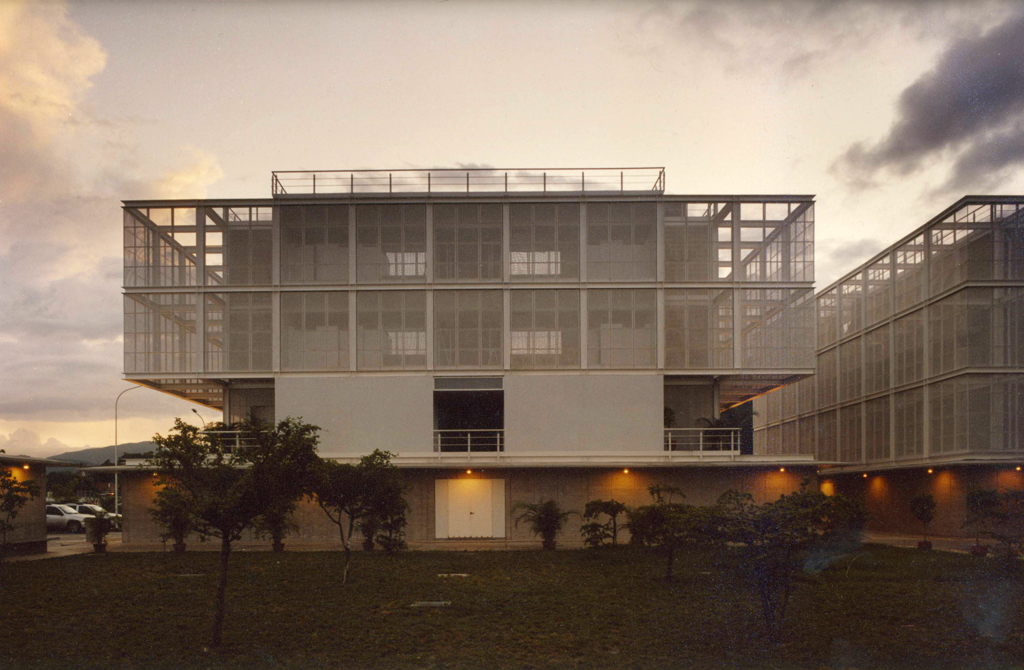 Fachada Este del Edf. Administrativo en la Villa del Cine.